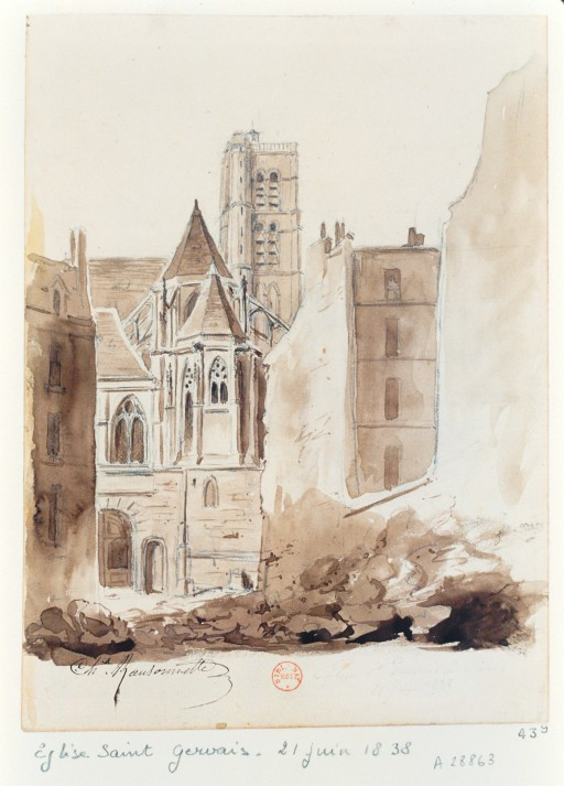 L'église Saint-Gervais (Paris) en 1838, dessin de Charles Ransonnette (1793-1877)